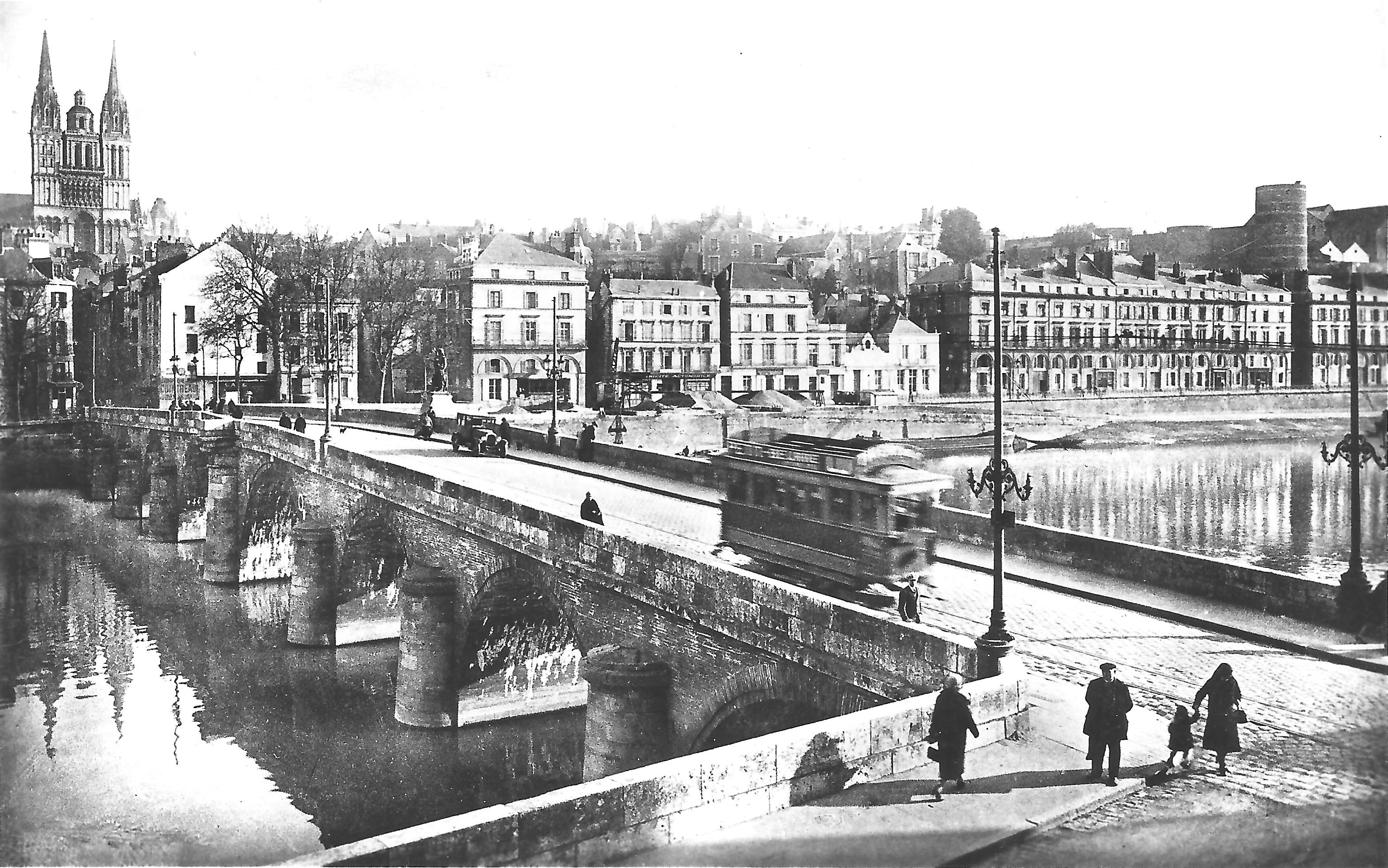 Oude postkaart van de brug Beaurepaire in Angers. Nu Pont de Verdon. Original caption in